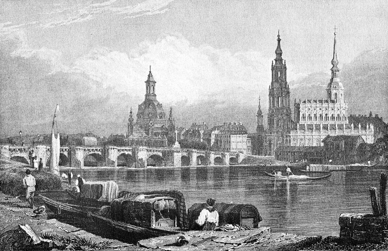 Historische Ansicht von Dresden an der Elbe.